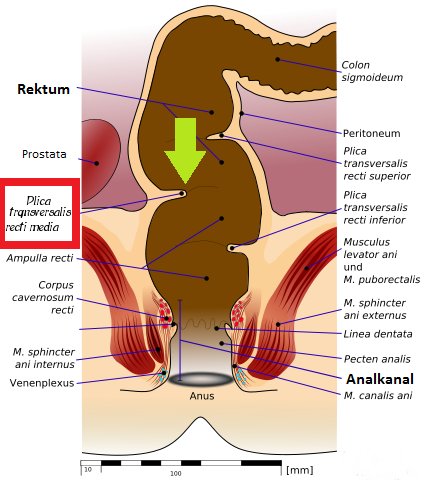 Rektum met Kohlrauschfalte